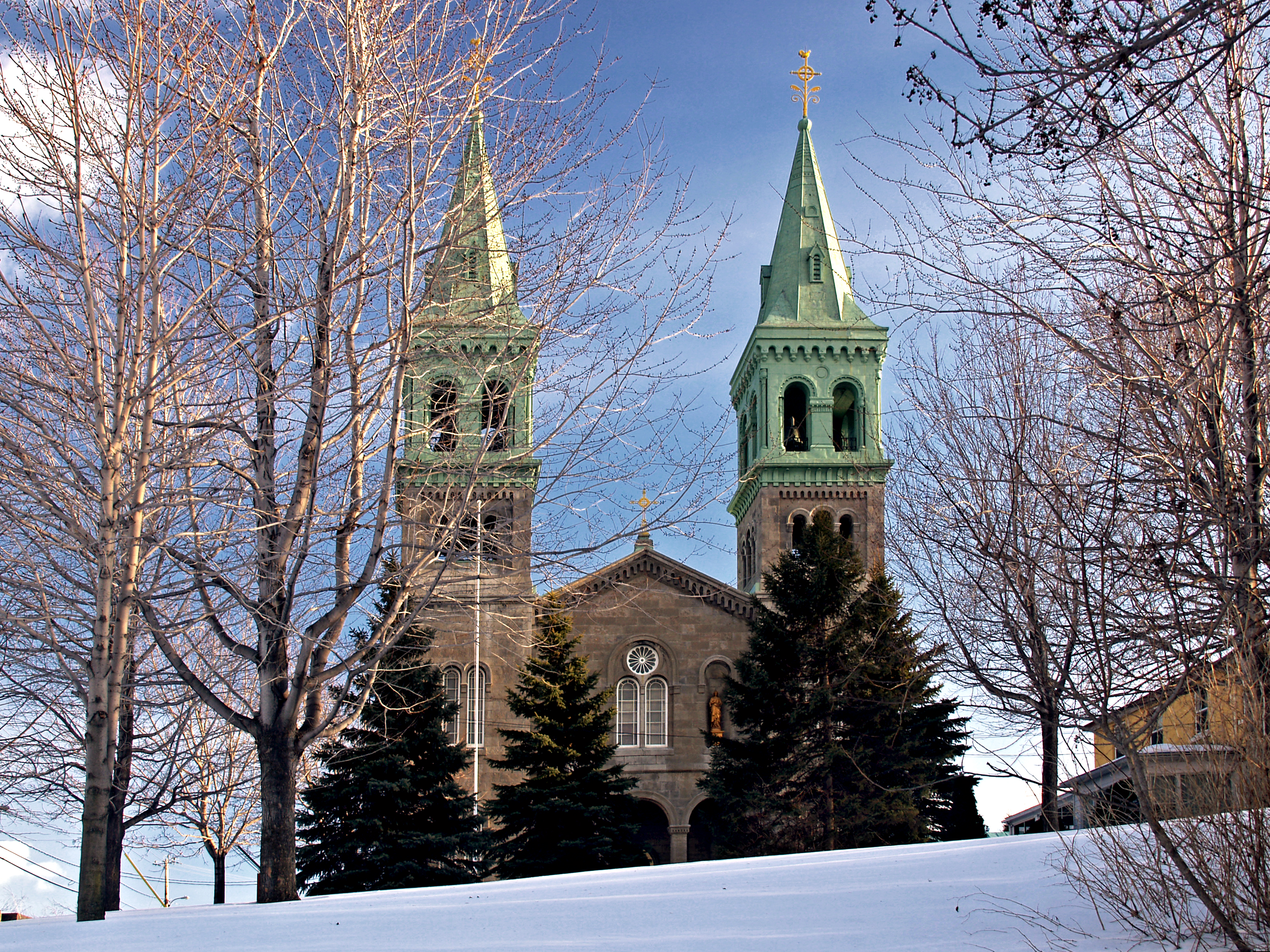 Beauharnois (Québec) - Église Saint-Clément